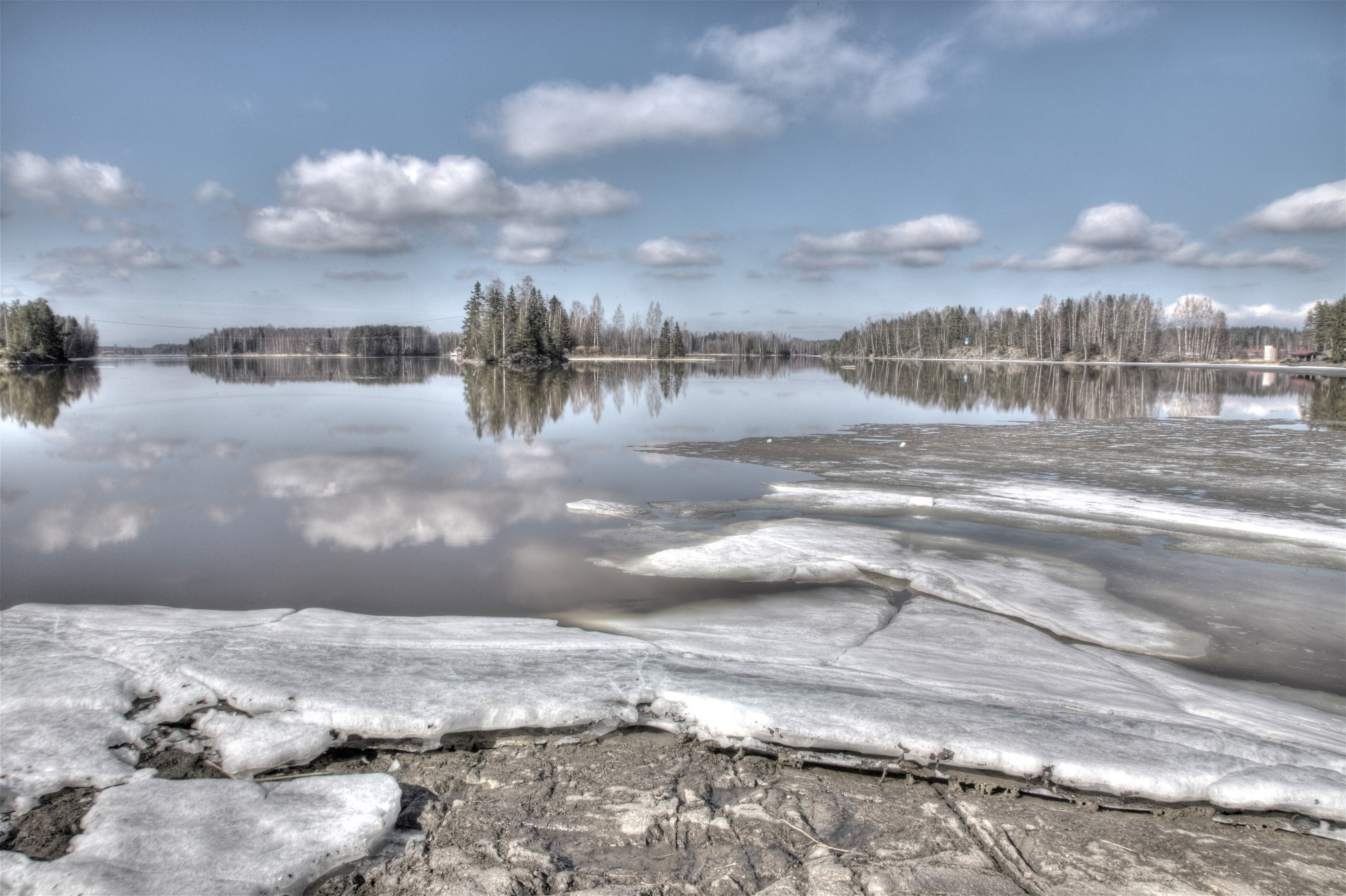 Pälpälänlahti, Kokemäenjoki